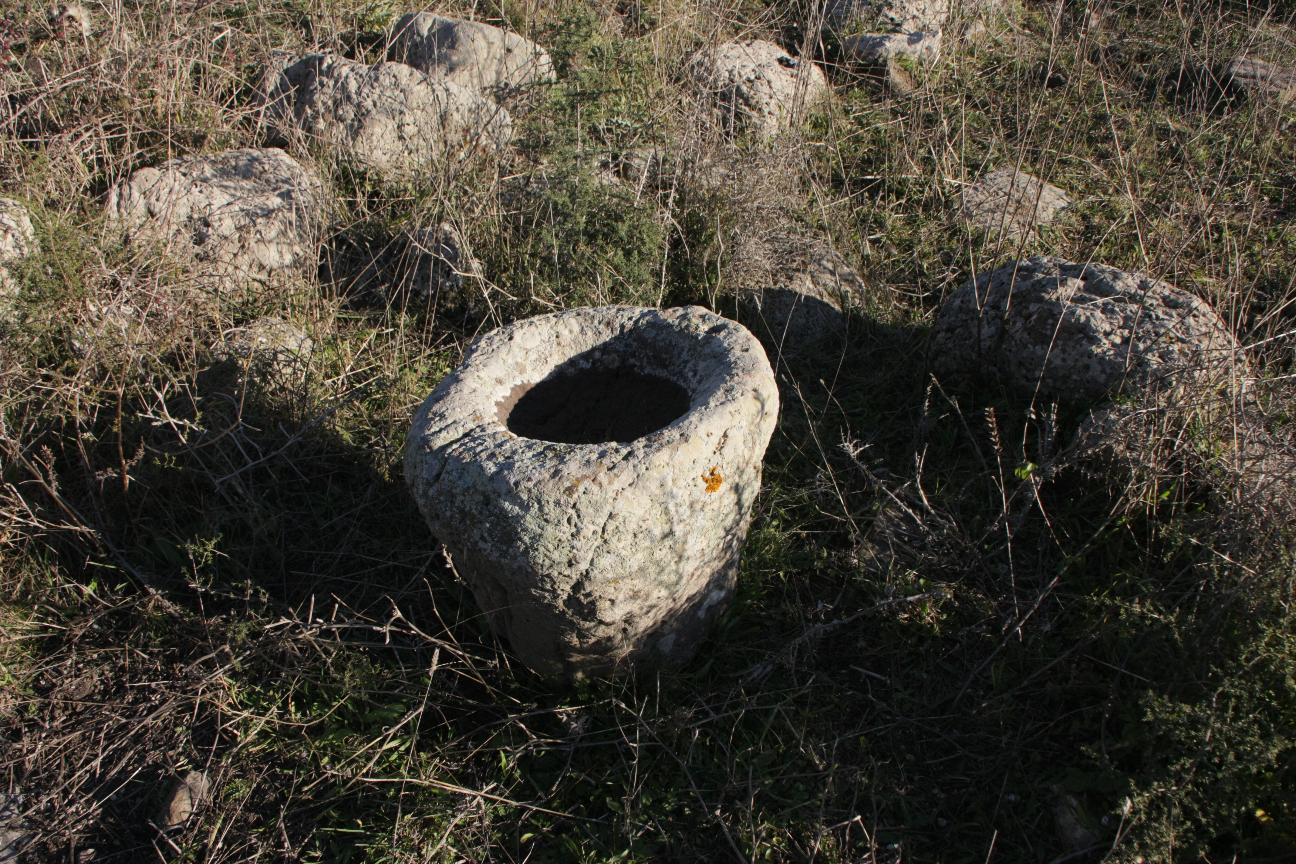 Casmene